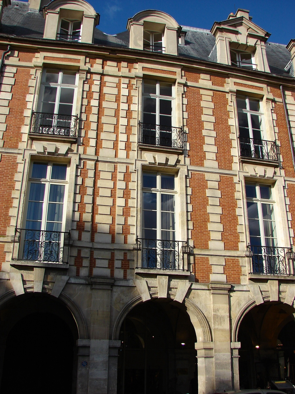 Hôtel de Bassompierre - 23 Place des Vosges - Paris 3 Vue de la façade principale This building is en partie classé, en partie inscrit au titre des Monuments Historiques. .